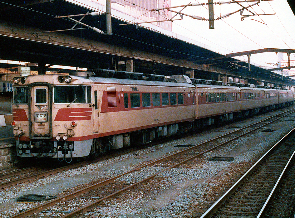 国鉄 キハ80系特急形気動車 特急「まつかぜ4号」